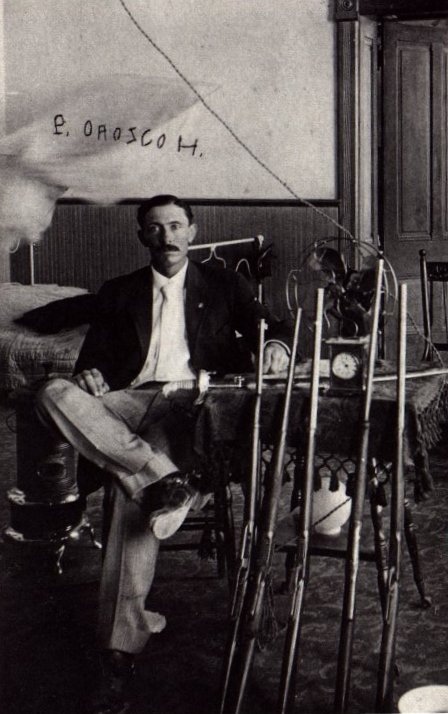 Fotografía de Pascual Orozco tomada antes de es:1915 (fecha de su deceso), por lo cual se considera parte del dominio público en los Estados Unidos.